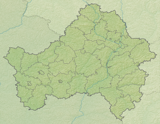 Физическая карта Брянской области, Россия. Проекция: Меркатор Координаты для GMT: -R31.15/35.41/51.78/54.10 Инструменты: GMT, Inkscape This map may be incomplete, and may contain errors. Don't rely solely on it for navigation.